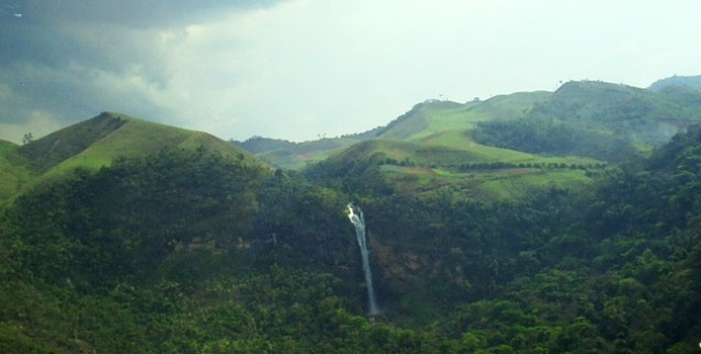 Cascata Conde D'Eu, fotografada por Marcio Seixas da Costa a partir de máquina fotográfica digitale de um helicóptero em 16 de outubro de 2008 às 17:49 minutos.